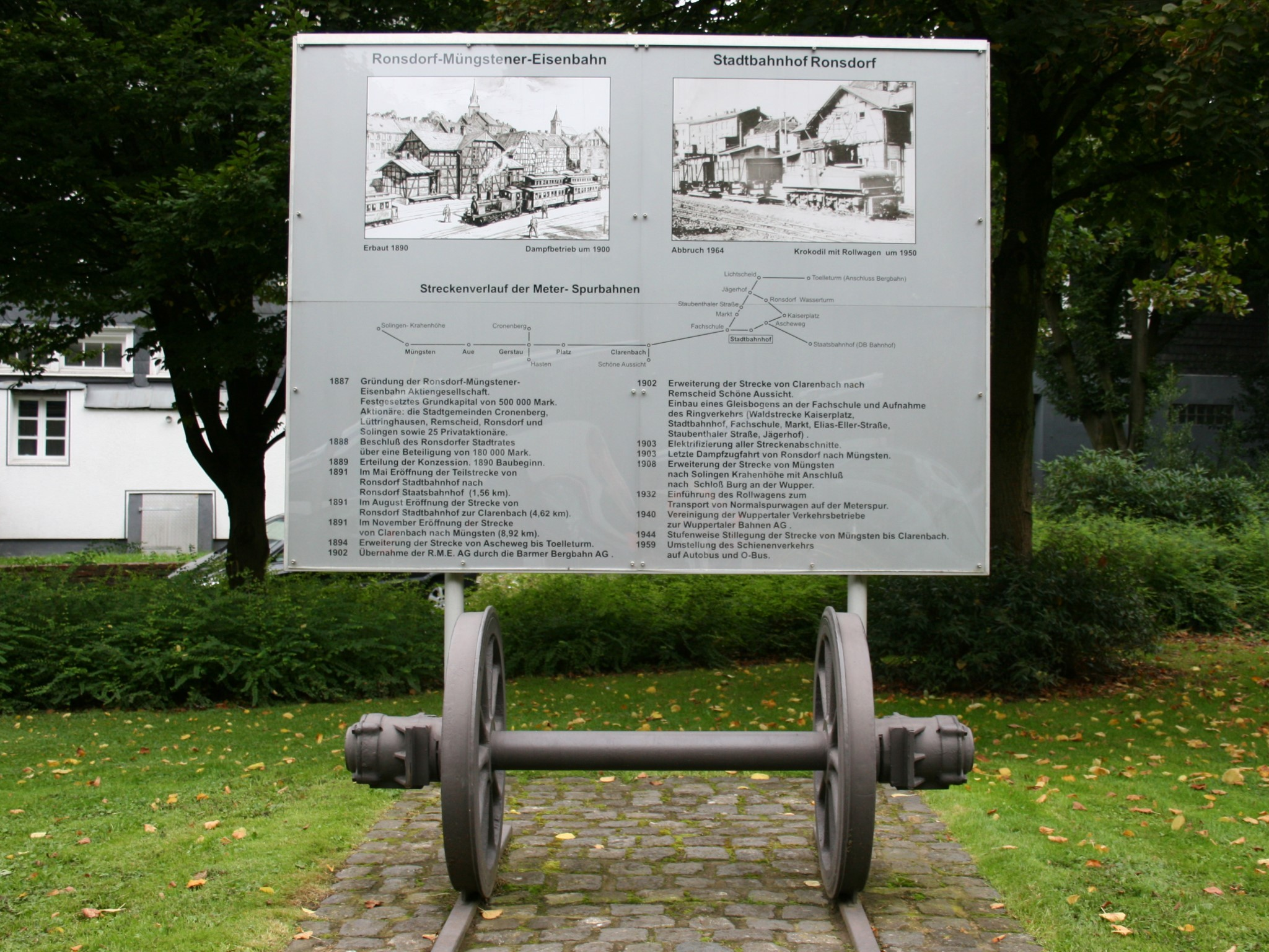 Wuppertal-Ronsdorf: Stadtbahnhof, Park und Denkmal